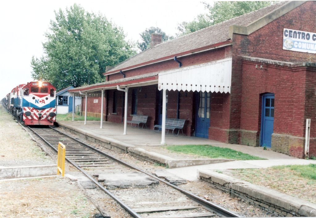 Estación ferroviaria, Aldao, Argentina